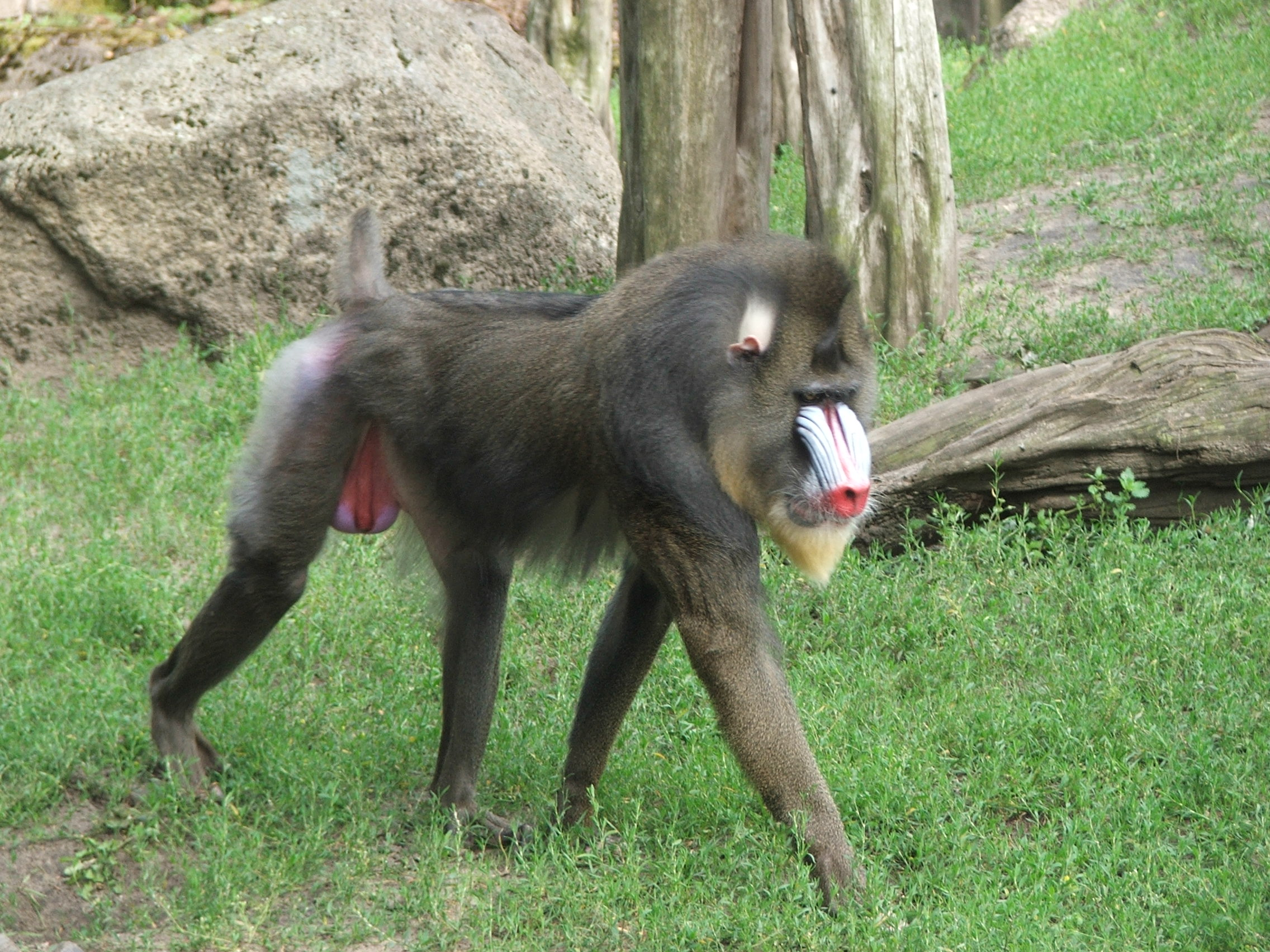 Mandrillus sphinx (ZOO in Ueckermünde)